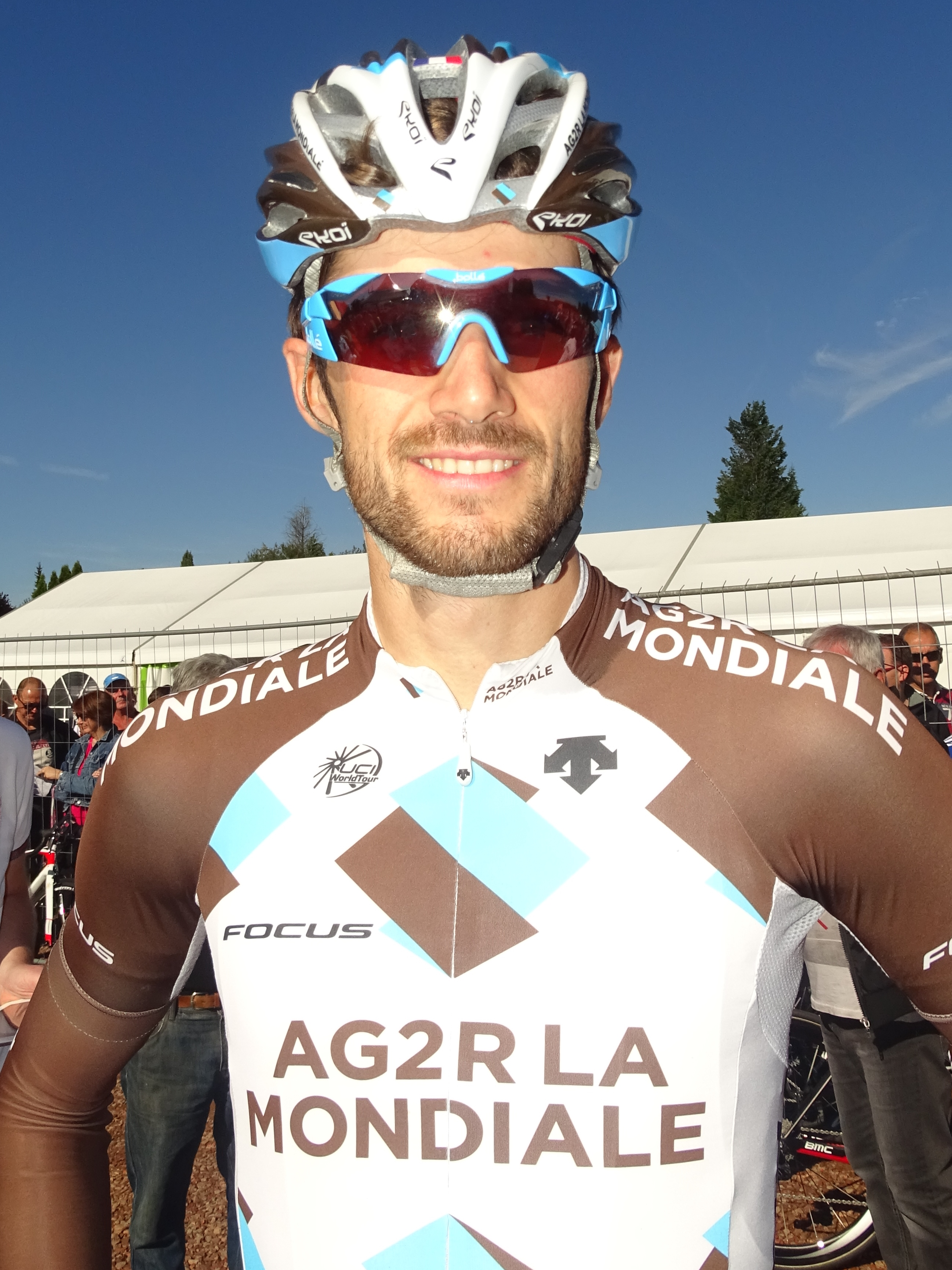 Reportage réalisé le dimanche 20 septembre à l'occasion du départ et de l'arrivée du Grand Prix d'Isbergues 2015 à Isbergues, Nord-Pas-de-Calais, France.